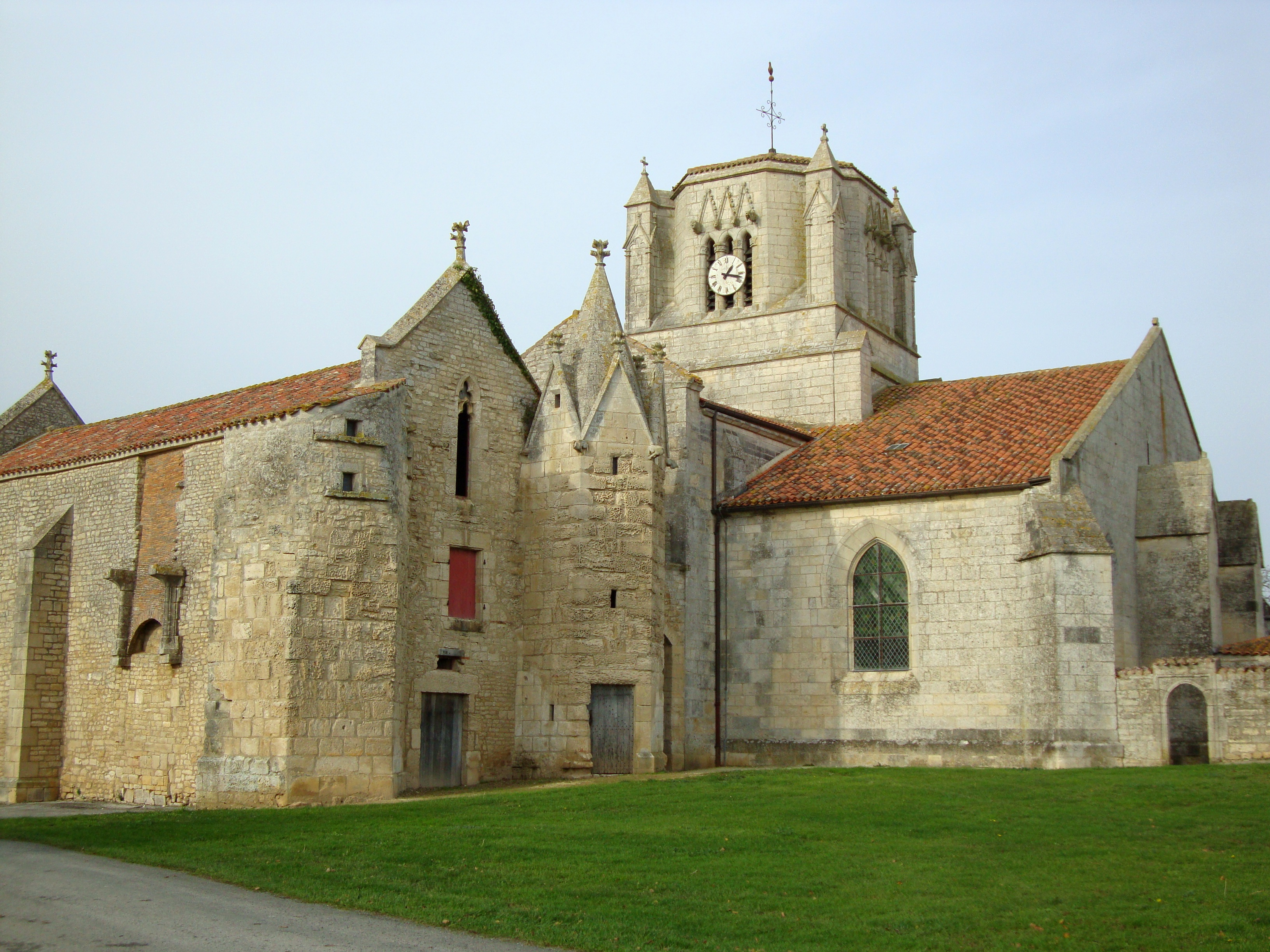 Église Saint-Nicolas des Magnils-Reigniers, (Classé, 1906) .